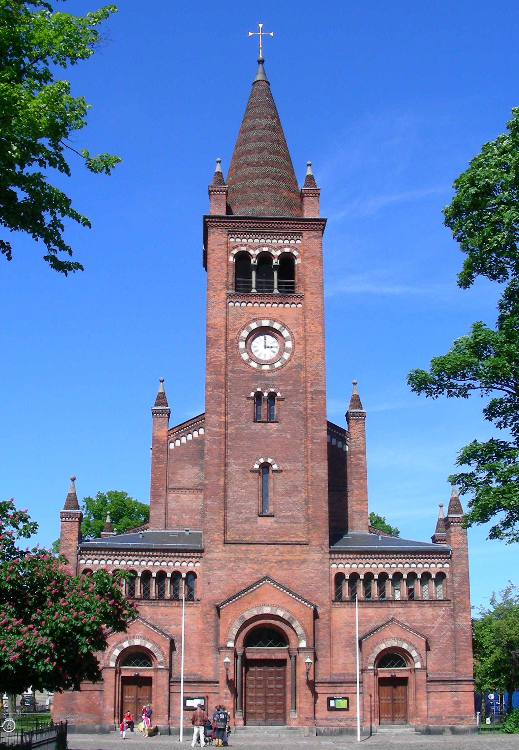 Sankt Pauls Kirke, Copenhagen, Denmark.